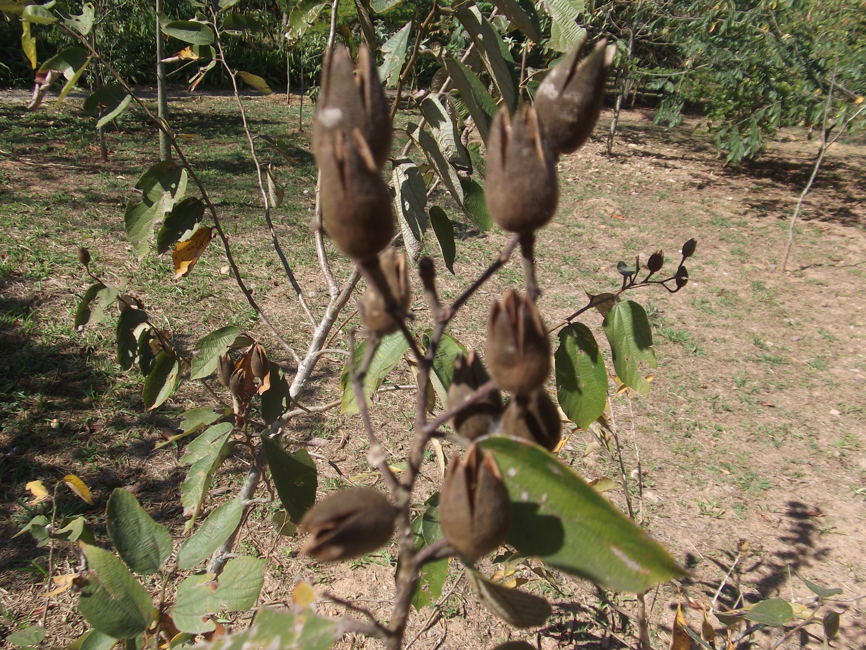 Planta Açoita-cavalo Luehea divaricata com detalhe para os frutos maduros da planta.